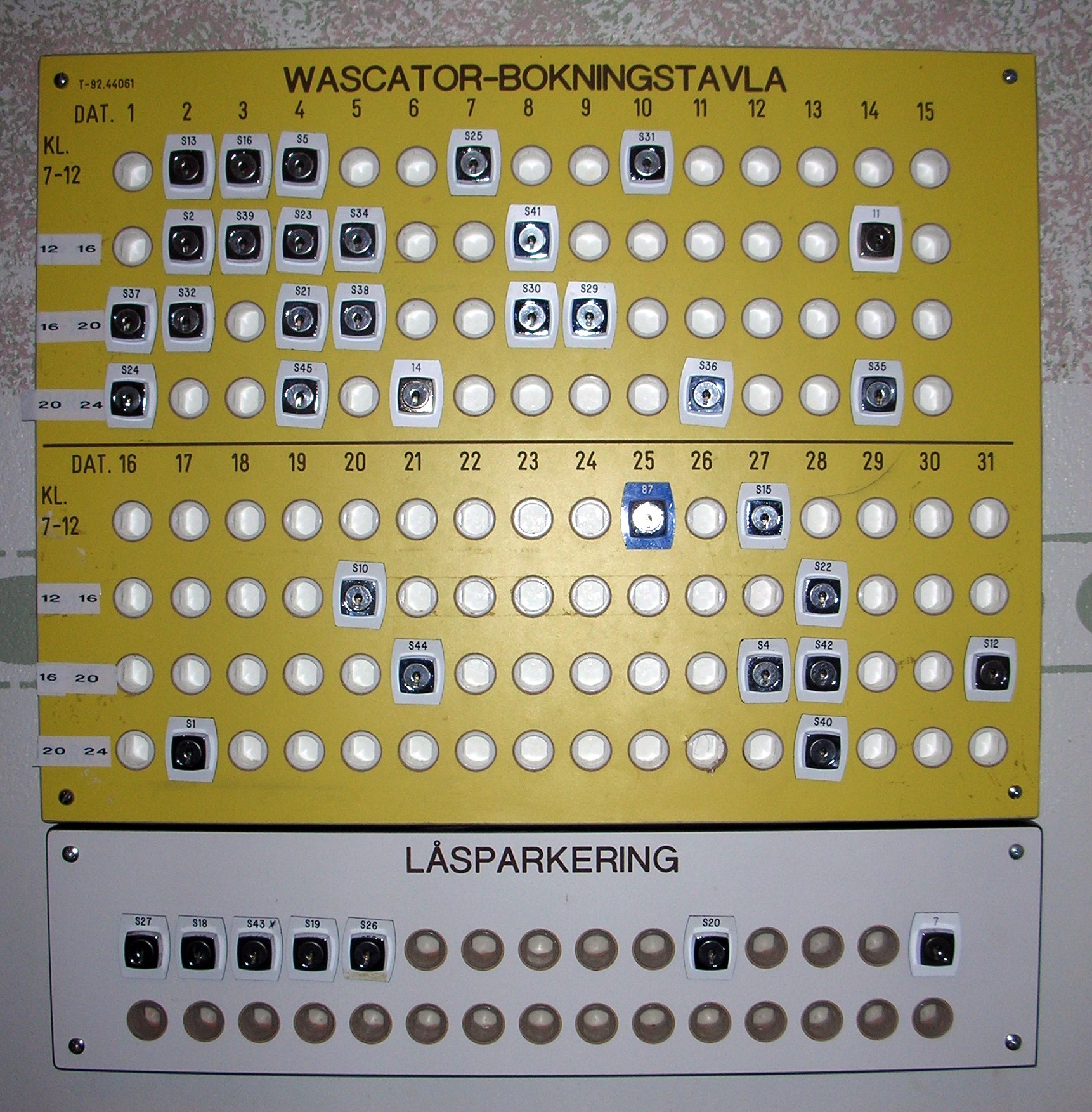 En bokningstavla i en svensk tvättstuga.